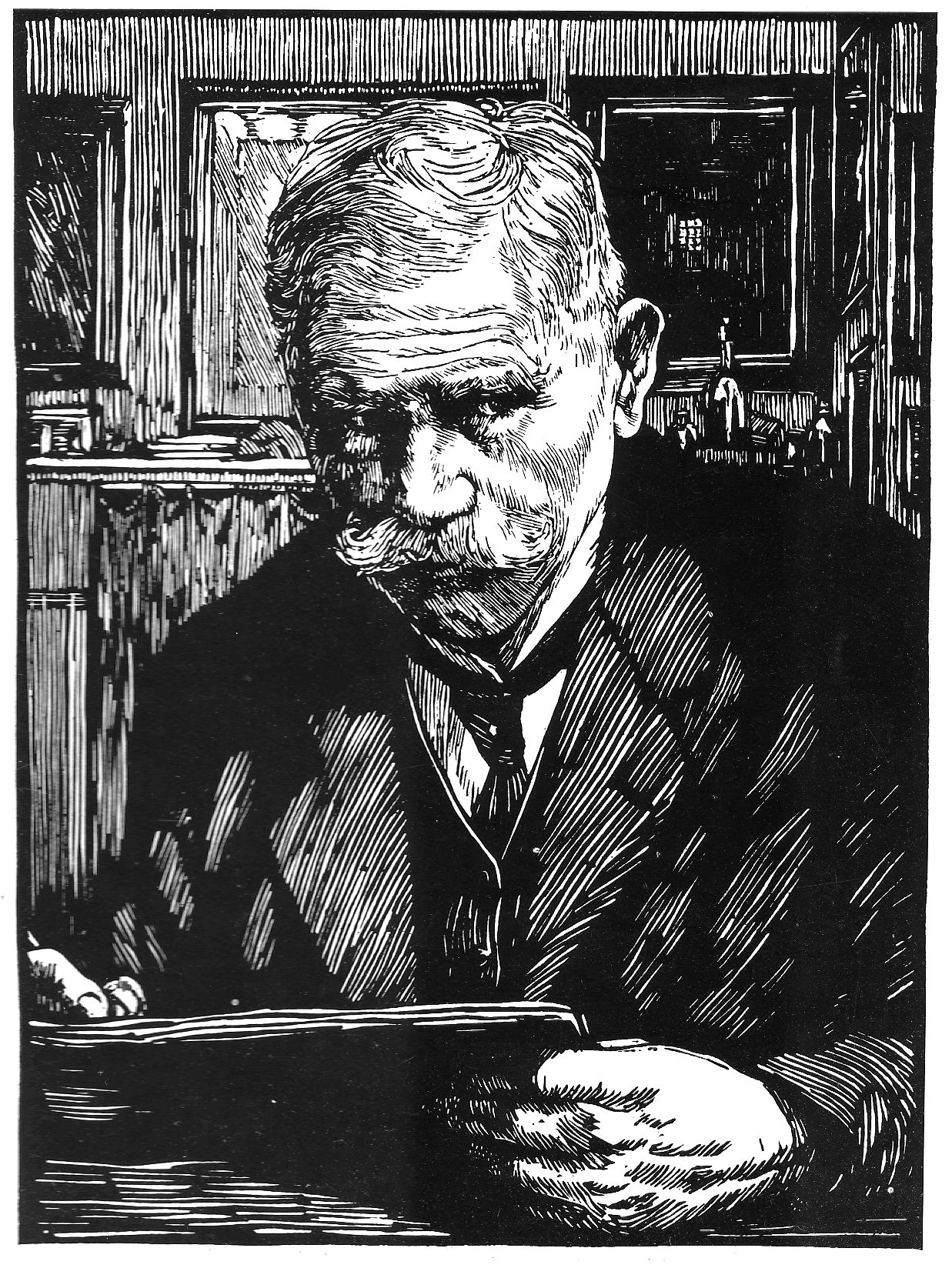 Selbstbildnis nach einem Holschnitt von Heinrich Otto